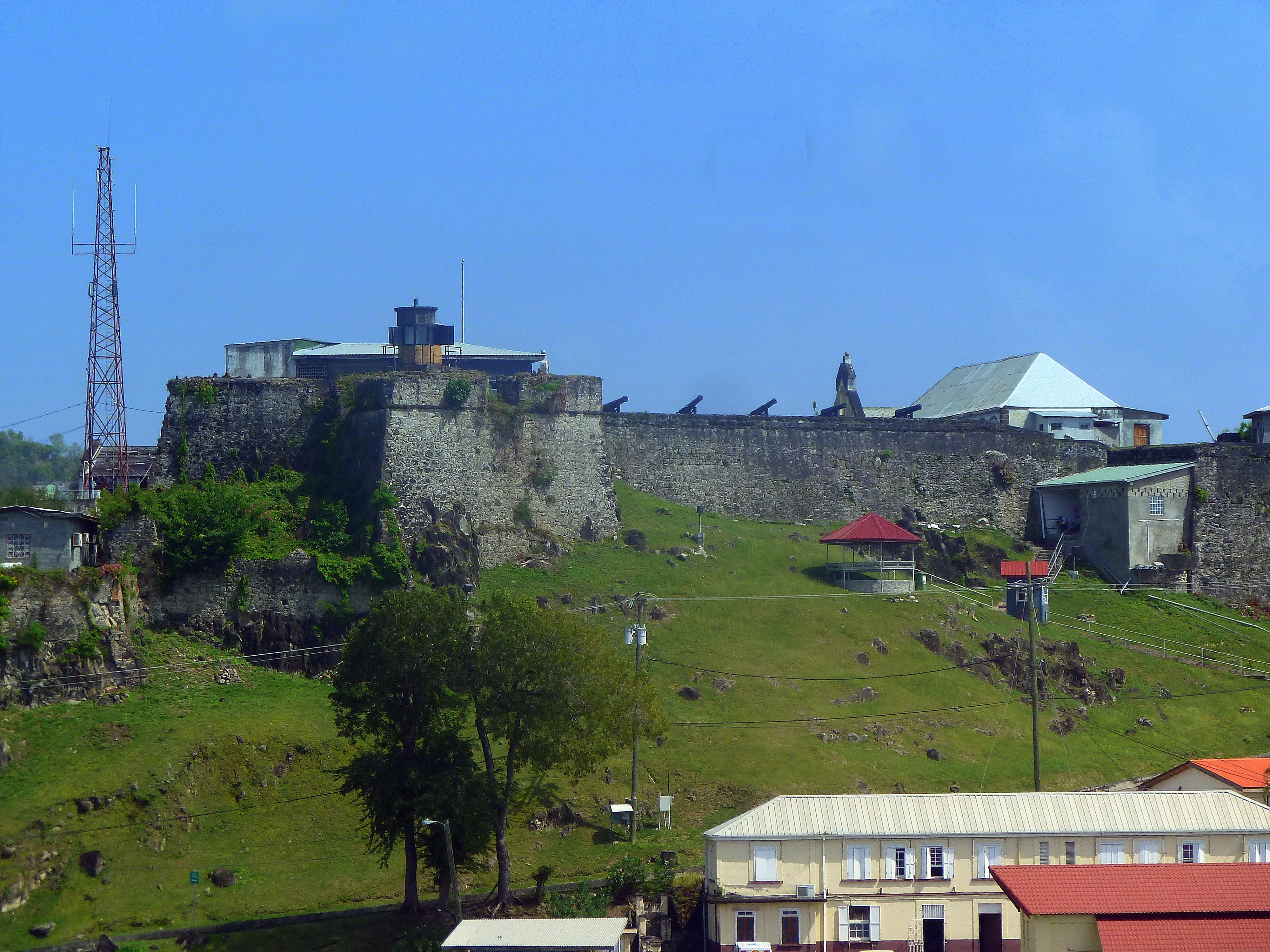 Grenada, Karibik - Fort George